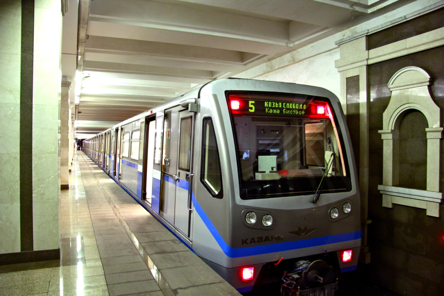 Kazan Metro (Казанский метрополитен)